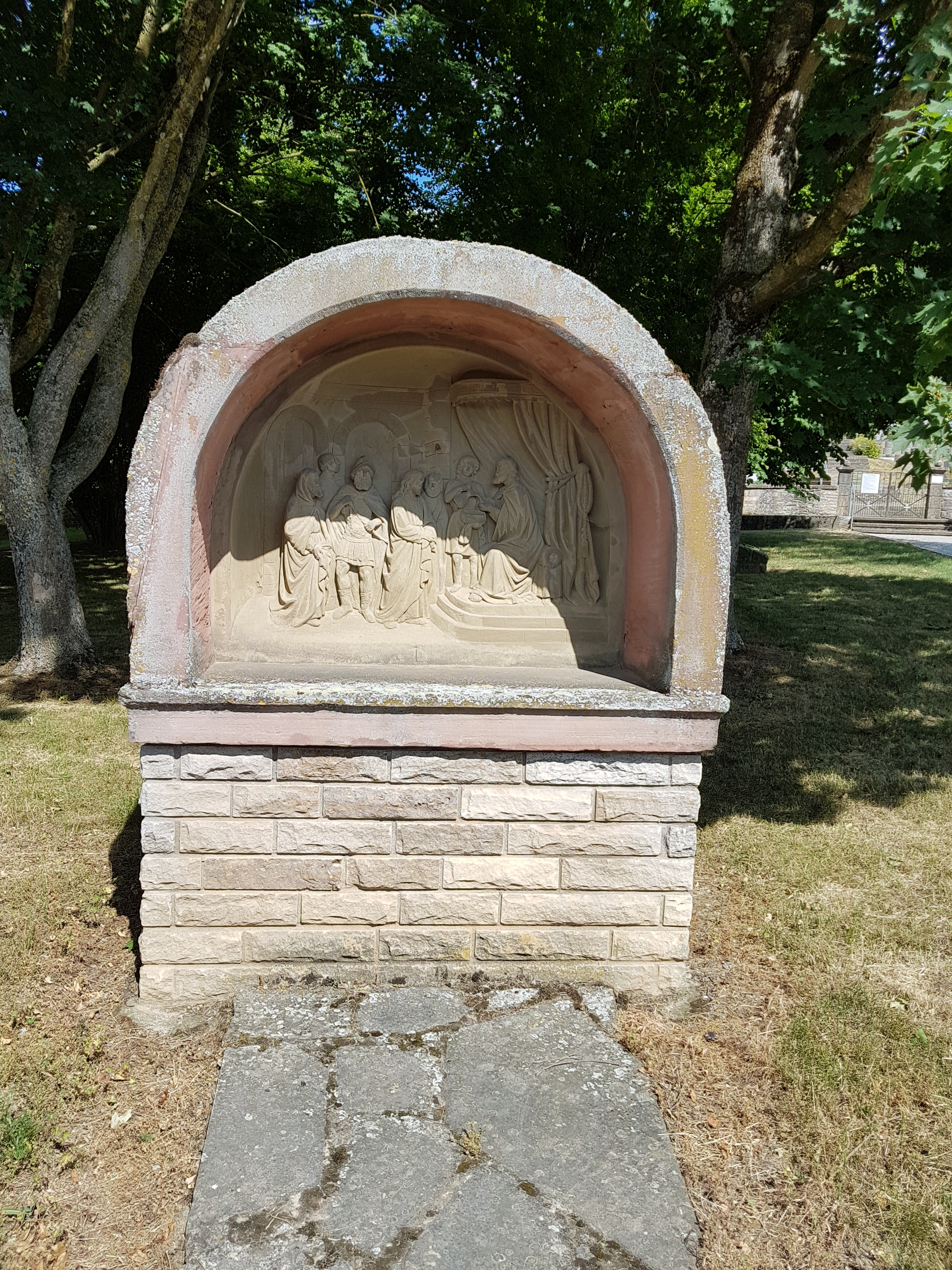 Kreuzweg zur Dittwarer Kreuzkapelle am Kreuzhölzle Bilder hochkant